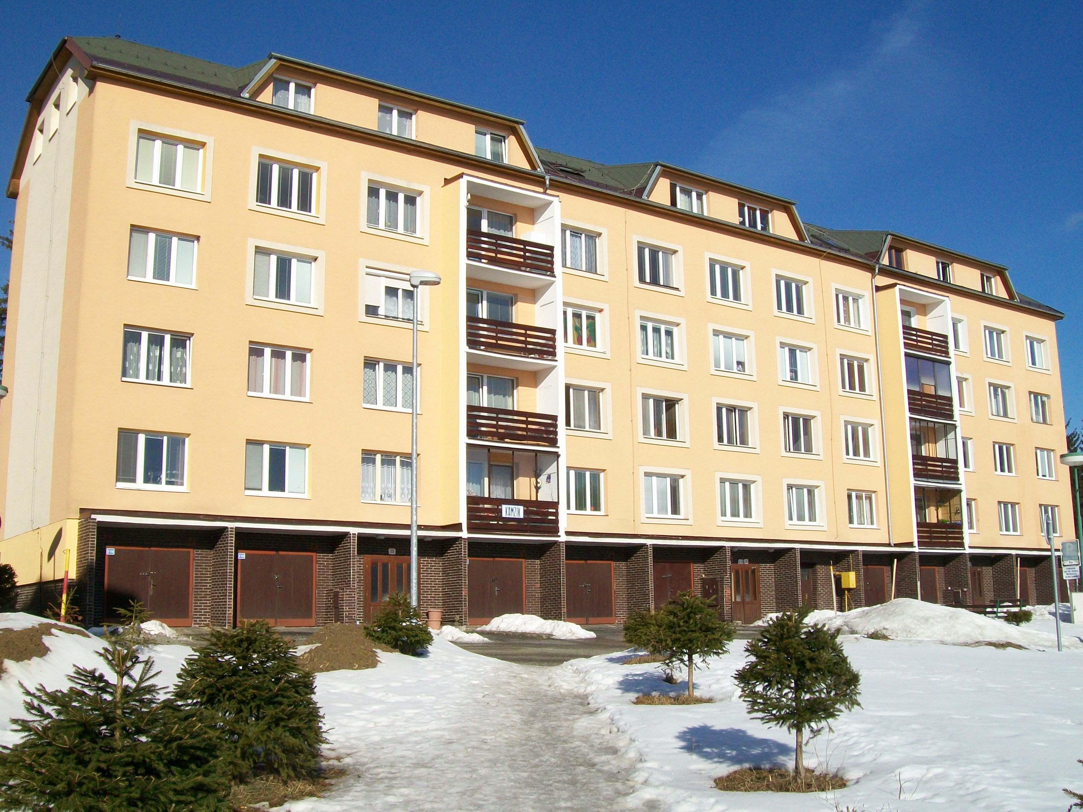 Bytový dom Kamzík v Tatranskej Štrbe